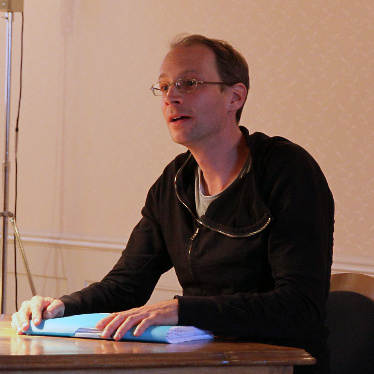 Albrecht Selge im Schloss Bonndorf bei der Lesung der Literaturstipendiaten des Landes Baden-Württemberg (2013)